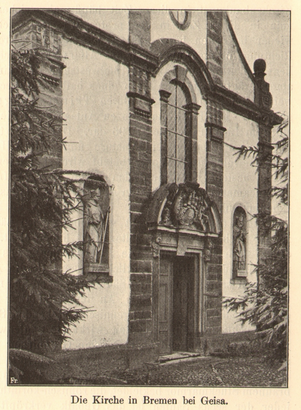 Teilansicht der Kath. Pfarrkirche St. Jakobus d.Ä. und Barbara in Bremen (Rhön).